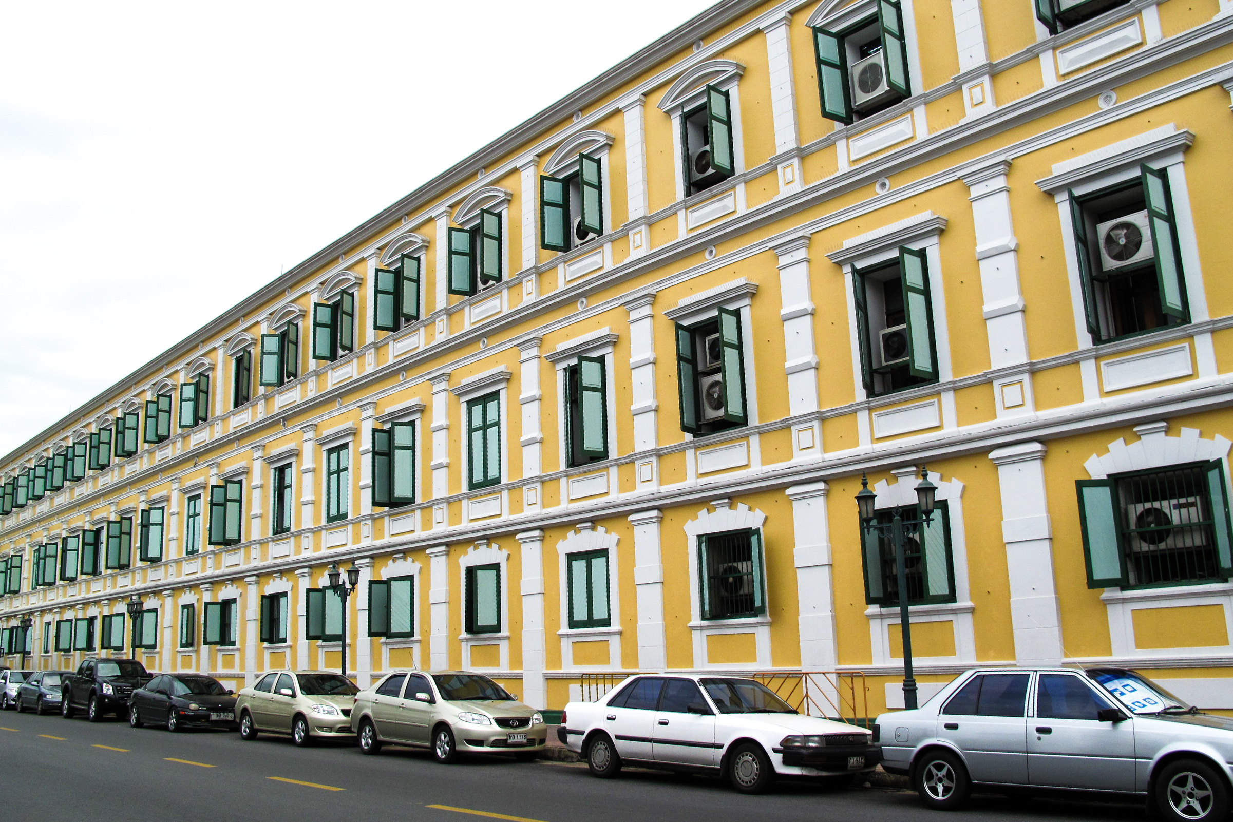 อาคารกระทรวงกลาโหม